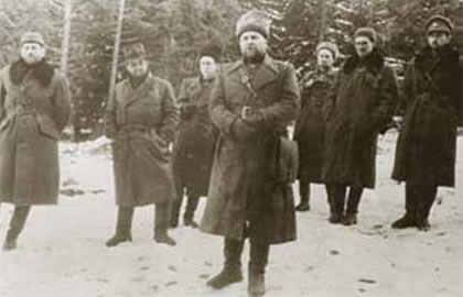 Slovensko, Nízké Tatry, 7. listopadu 1944 Mluvící čelně postavený plk. Alexej Nikitič Asmolov . Zleva; plk. Vladimír Přikryl, poslanec Bohumil Laušman, komisař parabrigády Michail Mojsejevič Glider, major Ivan Ivanovič Skripka, poslanec Rudolf Slánský, škpt. Karel Hlásný (1911-1982)